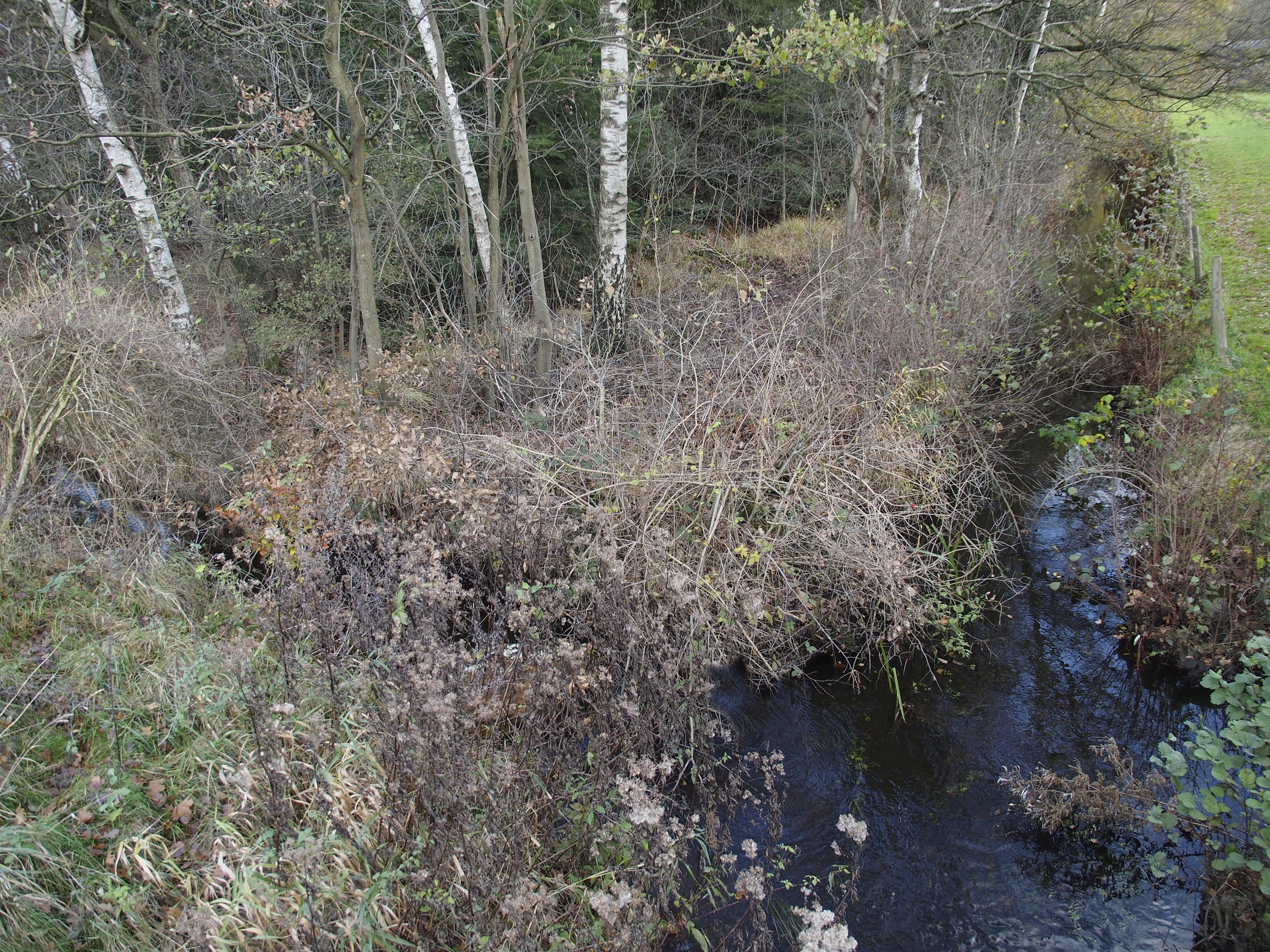 Ursprung des Bruchbach durch Zusammenfluss von Sunderbach (links) und Kohlenbach (rechts) bei Altensalzkoth, Naturpark Südheide, Niedersachsen, Germany